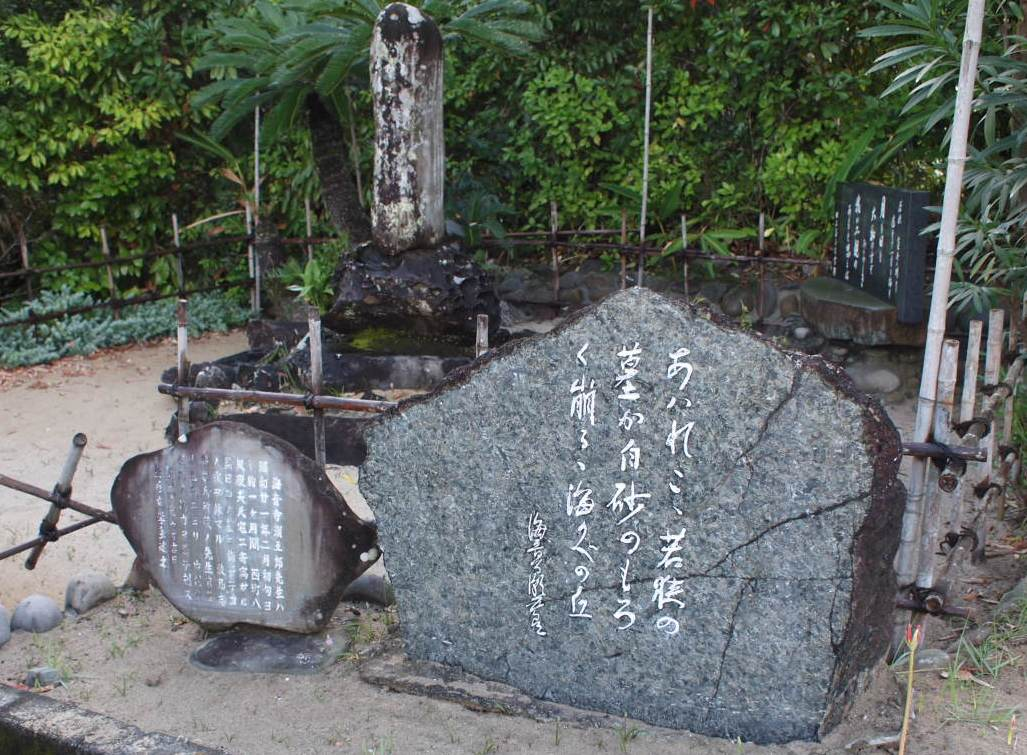 鹿児島県西之表市、若狭の墓のそばに建つ海音寺潮五郎の歌碑